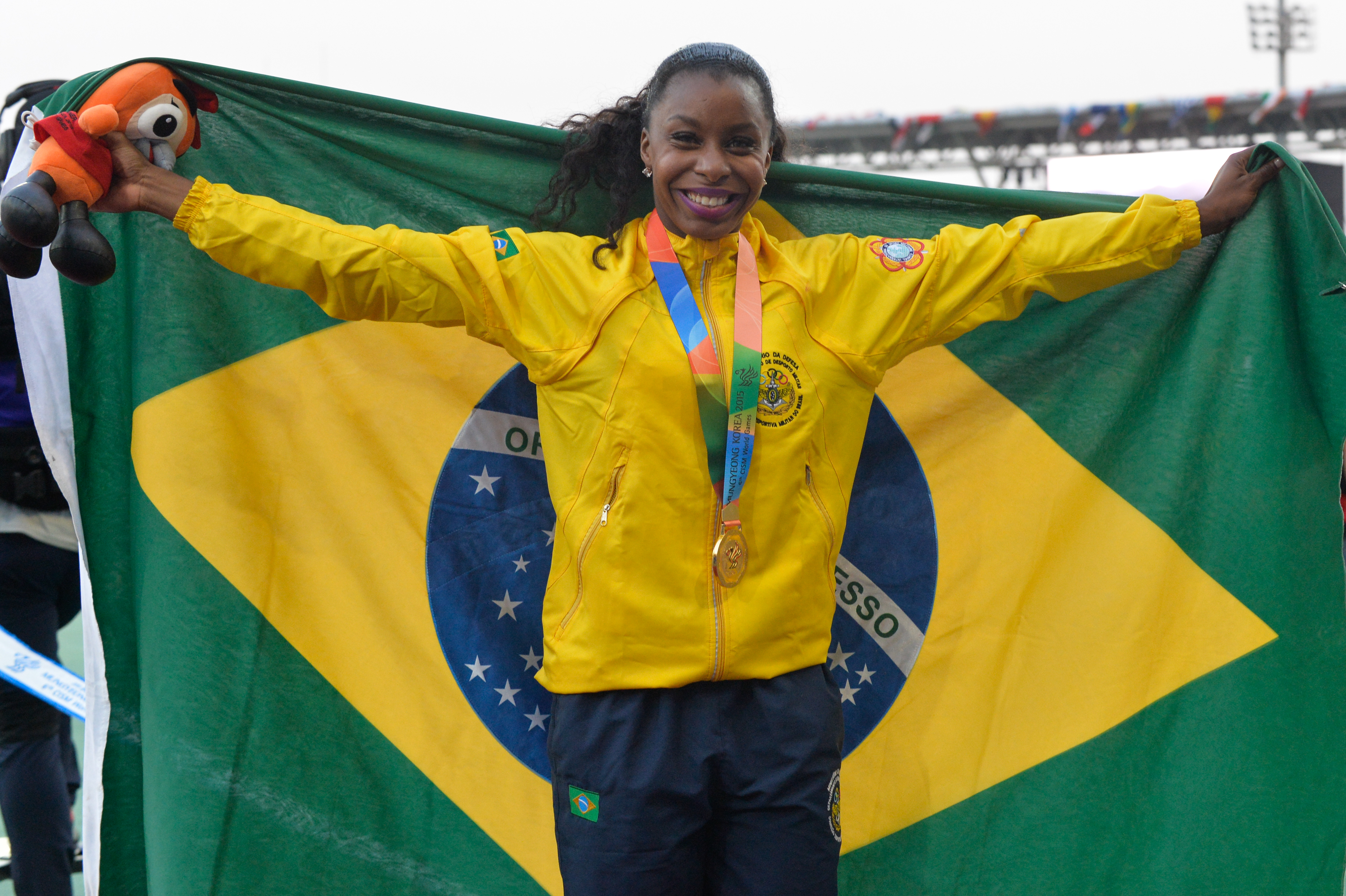 Rosângela Santos ganha medalha de outro nos 100 metros feminino. Foto: Felipe Barra